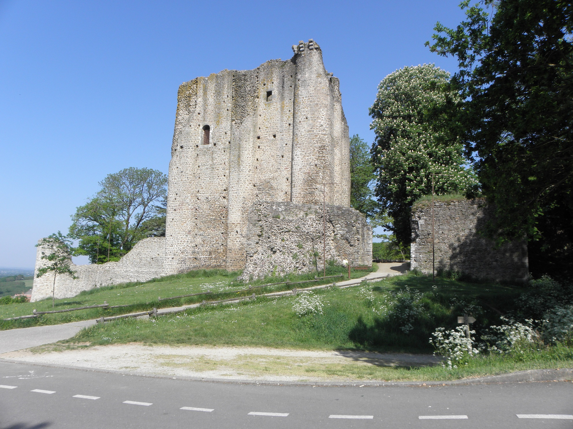 Château de Pouzauges (85).